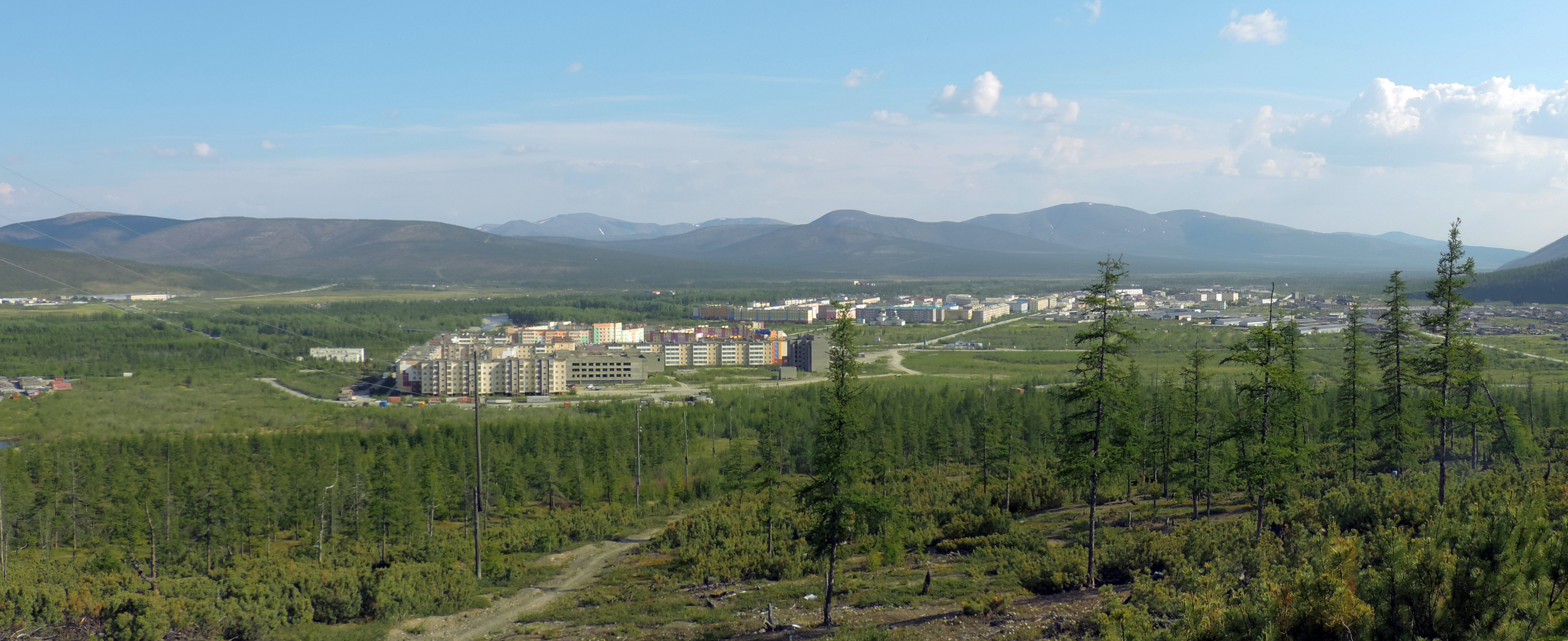 Bilibinsky District, Chukotka Autonomous Okrug, Russia